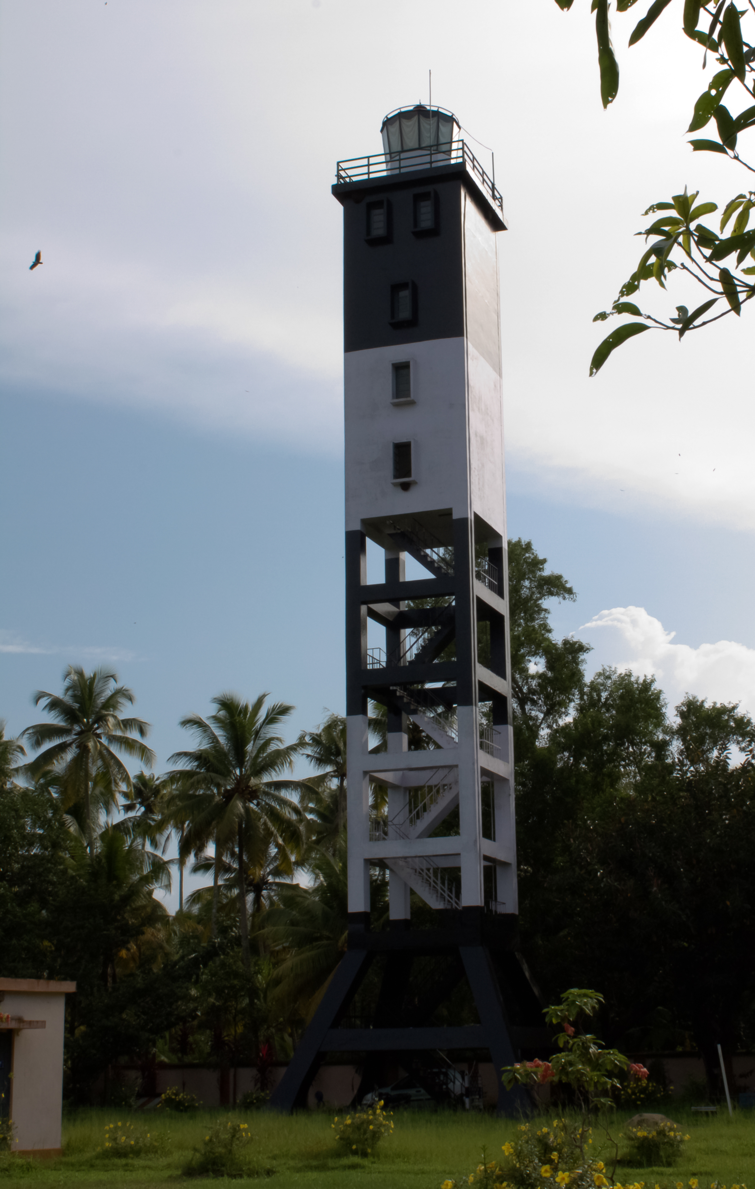 ചേറ്റുവയ്ക്കടുത്തുള്ള അഴീക്കോട് വിളക്കുമാടം. ചേറ്റുവ വിളക്കുമാടം എന്ന പേരിൽ വൃത്തസ്തംഭാകൃതിയിലുള്ള മറ്റൊരു വിളക്കുമാടം കൂടി ഈ പ്രദേശത്ത് നിലവിലുണ്ട്.